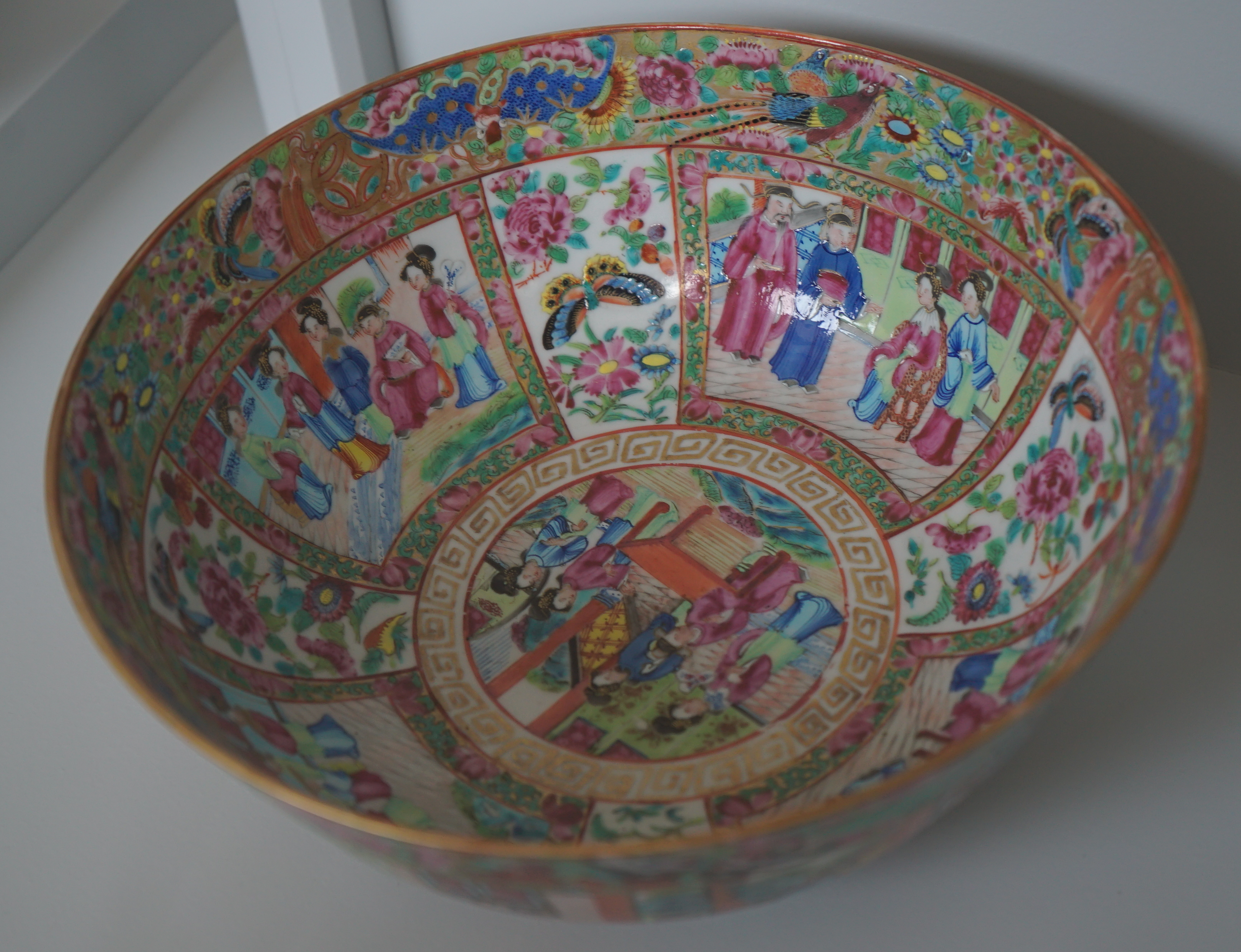 présenté au musée de Commercy.